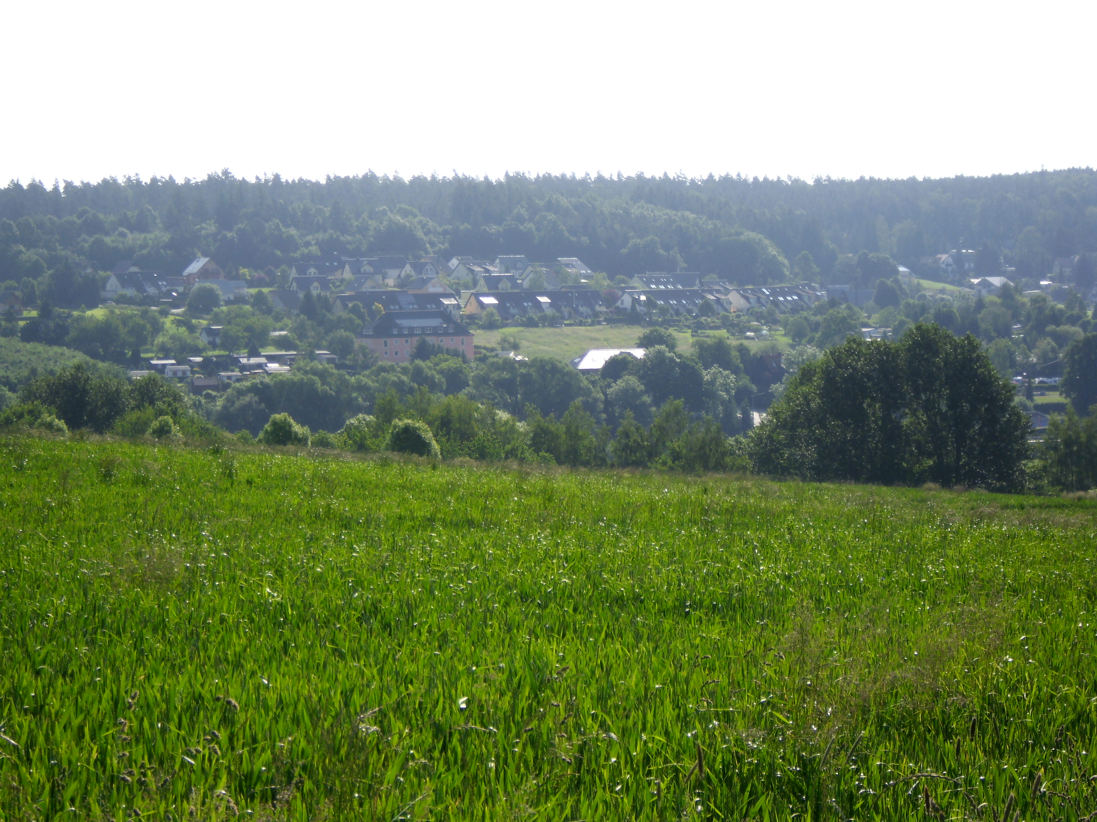 Vom Wildsteig in Seifersdorf blickend auf die Neue Häusesiedlung von Malter, den Sonnenhang und den ehemaligen Kurhaus.